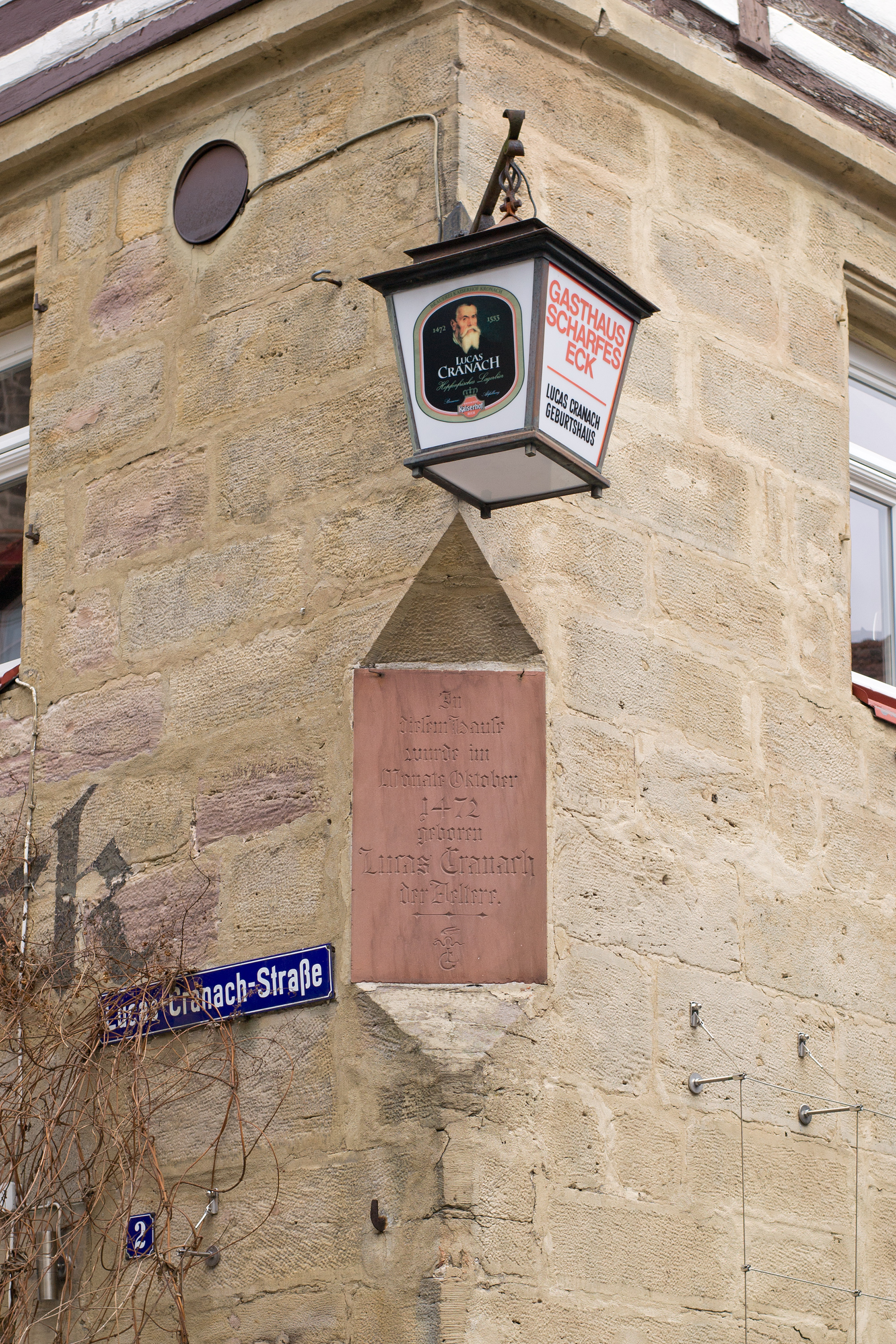 Hinweistafel am Gasthaus zum Scharfen Eck, Lucas-Cranach-Straße 2, Kronach. Dass es sich bei dem Gebäude um das Geburtshaus von Lucas Cranach dem Älteren handelt, entspricht jedoch nicht den Tatsachen; Cranachs Elternhaus befand sich an der Nordseite des Marktplatzes, wo heute das neue Rathaus der Stadt steht.